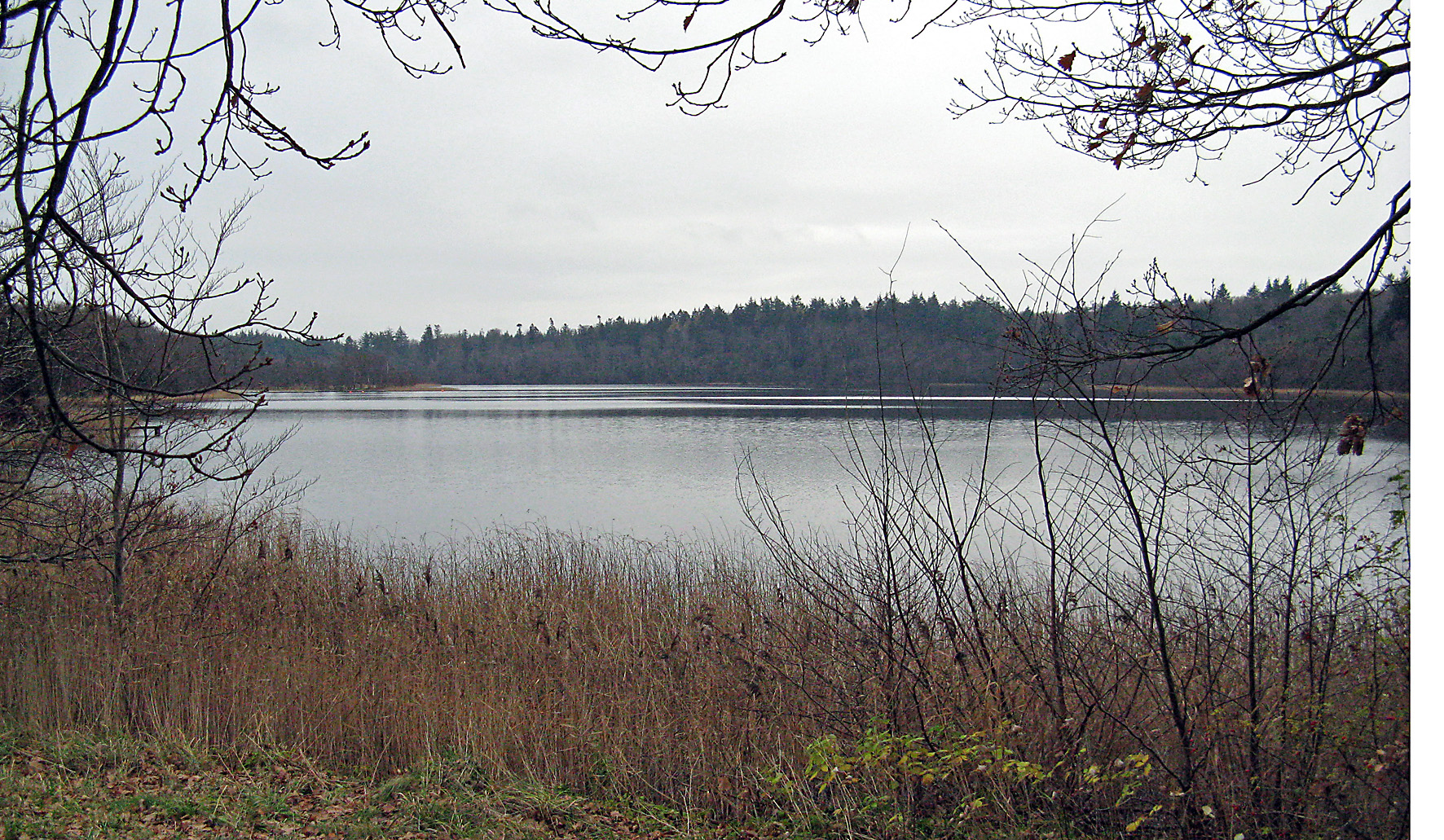 Almindsø ved Silkeborg i Jylland